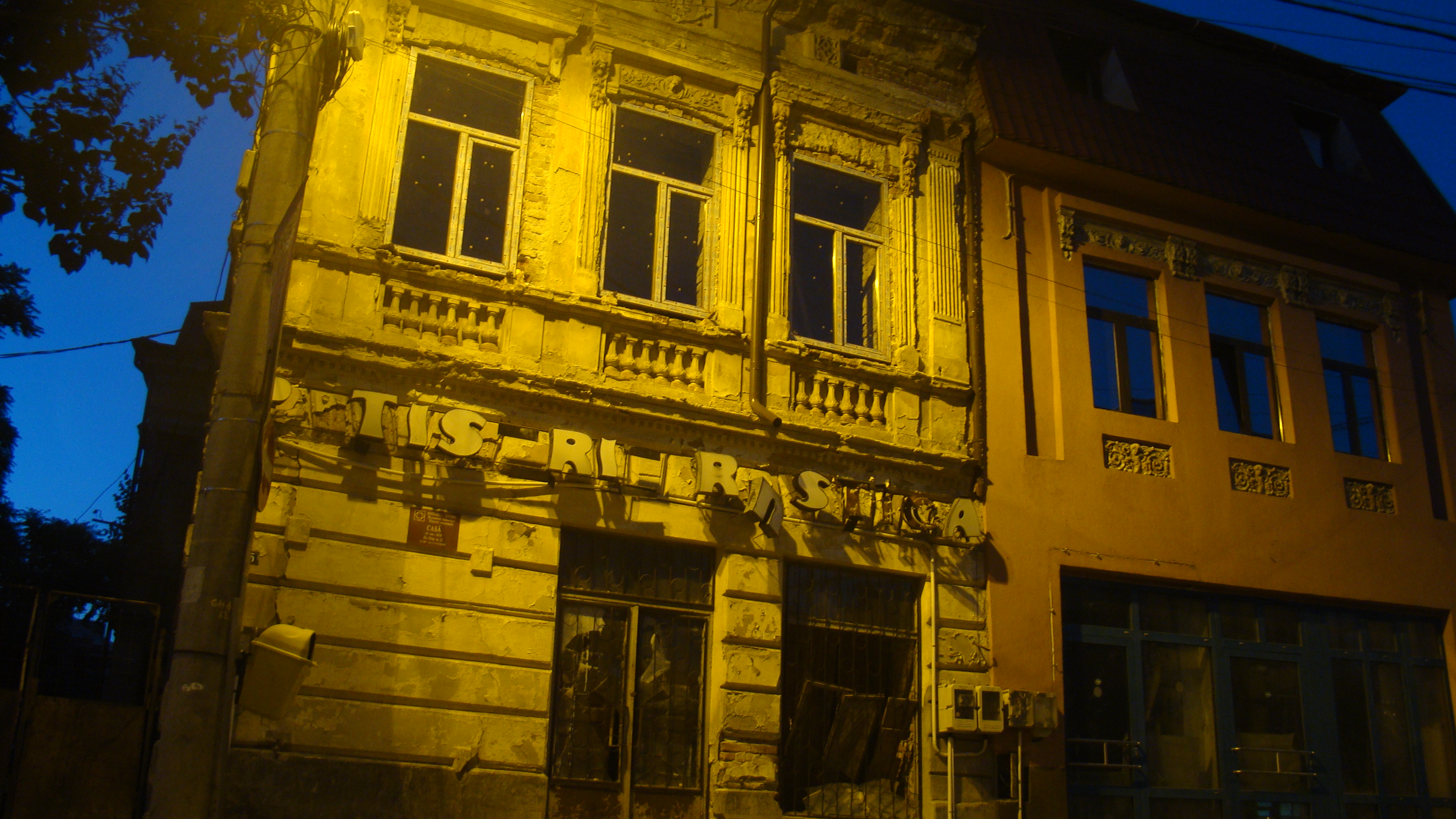 Casă Str. Olteț 25